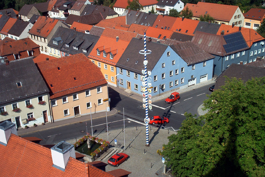 Floß(Gemeinde) - Deutschland/BY